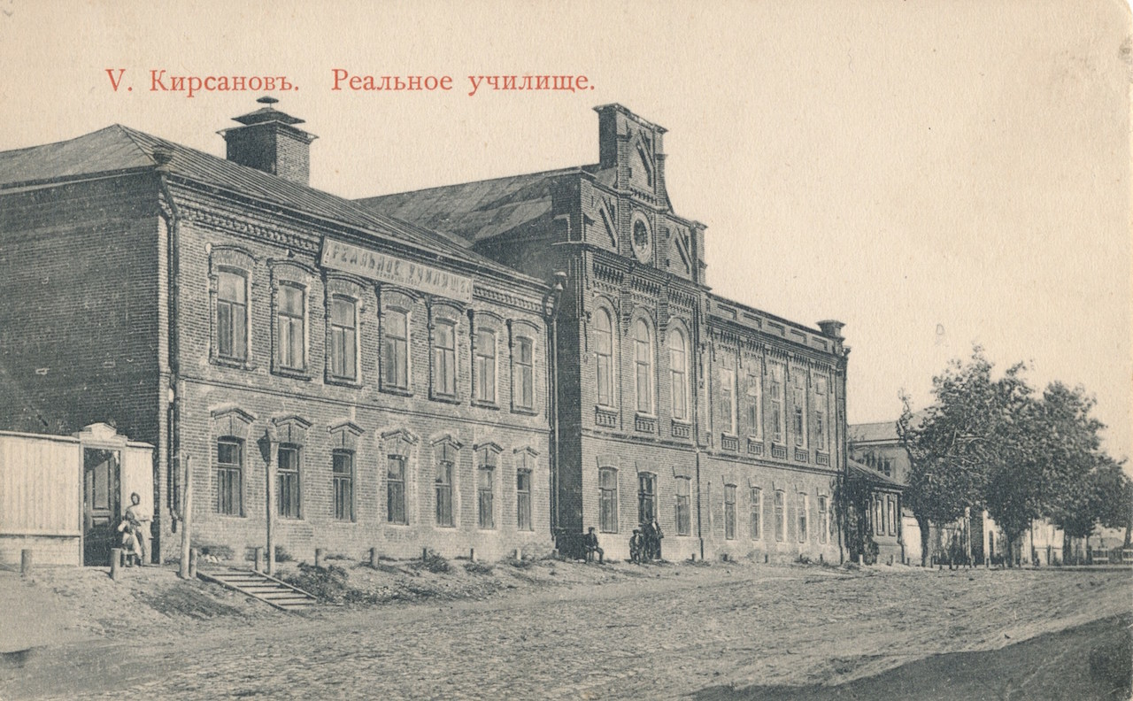 Кирсанов - Реальное училище (нач. XX)